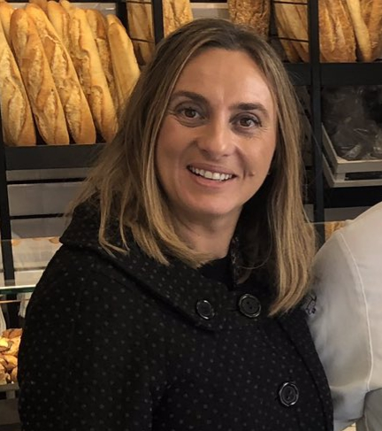 Imagen de Marifrán Carazo (1977), consejera de Fomento de la Junta de Andalucía y parlamentaria granadina. Recorte de foto tomada durante la campaña electoral para las Elecciones al Parlamento de Andalucía de 2018 en un acto con la Asociación de Pasteleros de Granada, en la localidad de Alfacar (Granada).